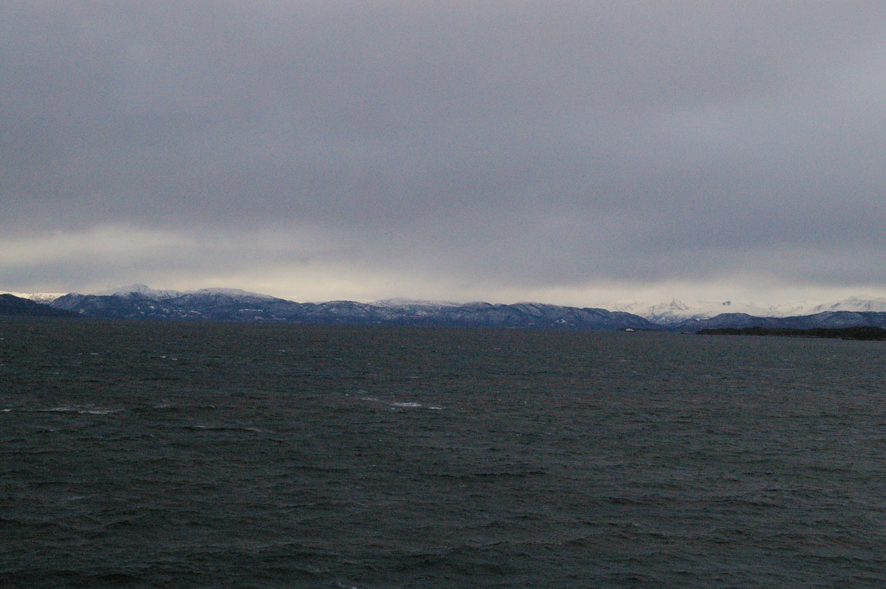 Bjørnafjorden seen eastwards from the ferry between Sandvikvåg and Halhjem.